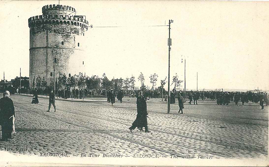 Salonique - La tour blanche